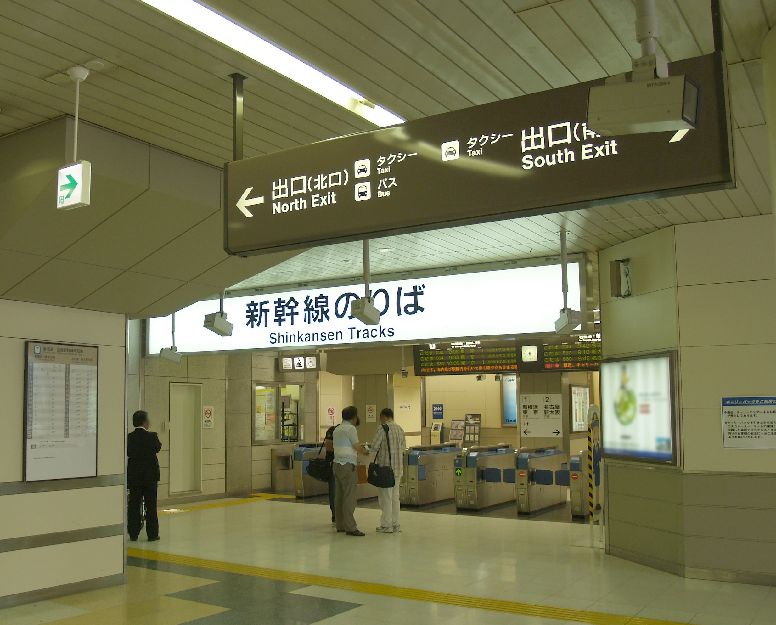 新富士駅改札口